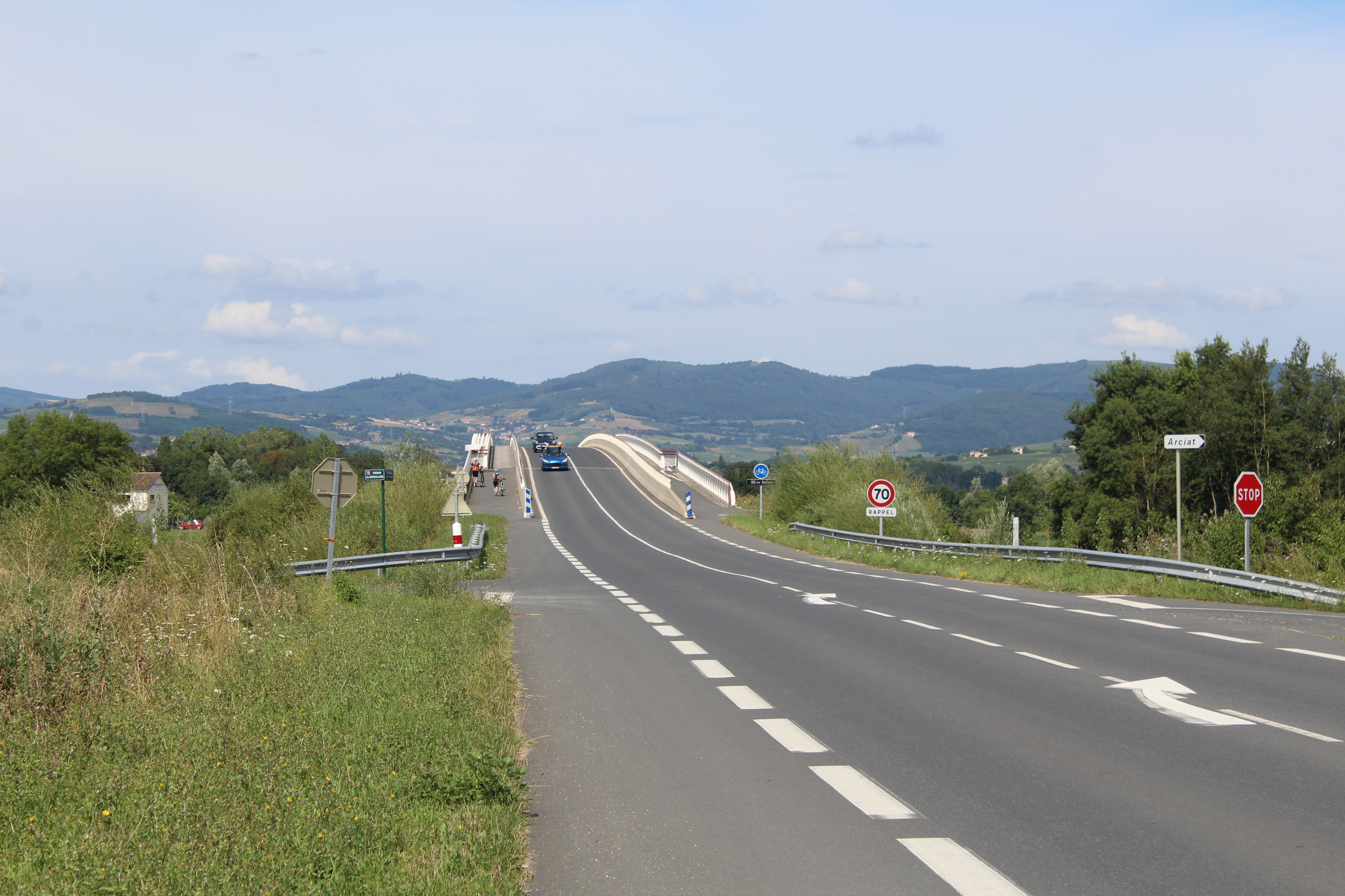 Nouveau pont d'Arciat, inauguré en 2010, reliant Cormoranche-sur-Saône et Crêches-sur-Saône.